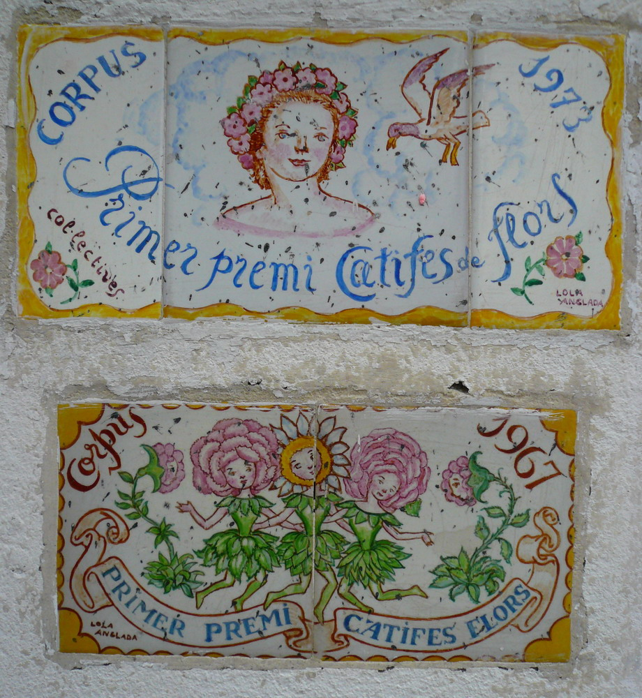 Rajoles de premi al concurs de catifes de flors de Sitges, obra de Lola Anglada. Es troben al carrer de Jesús